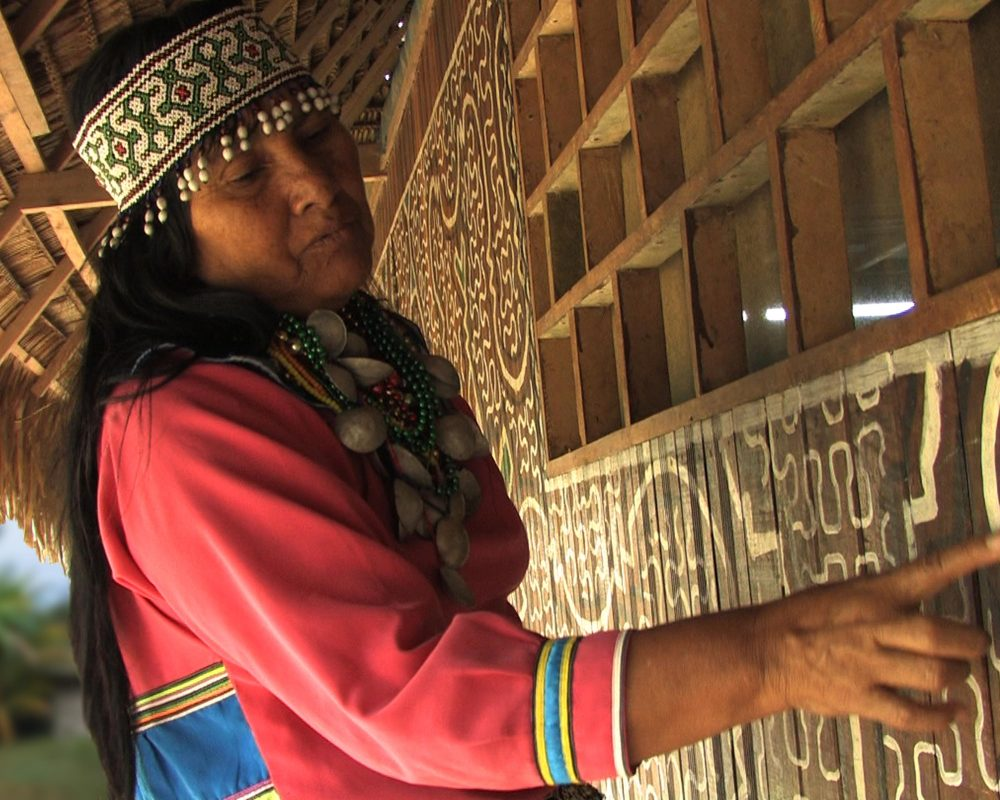 Herlinda Agustín still.